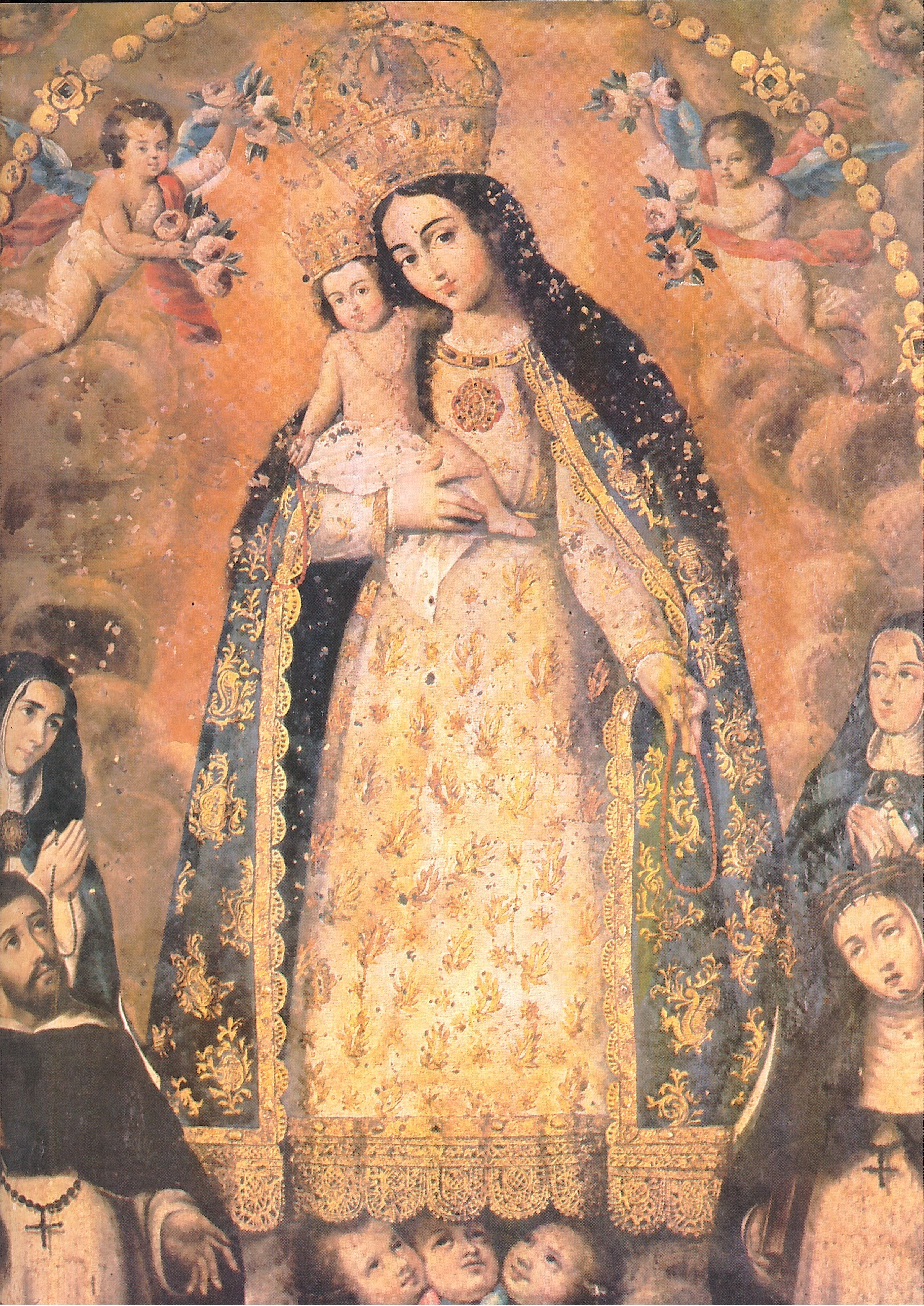 Vargas, José María; Cevallos García, Gabriel y otros investigadores. (1985).Historia del Arte Ecuatoriano Tomo 2. Salvat Editores S.A. Barcelona, España – Quito, Ecuador. Consultado y compartido por J. Javier G. A.